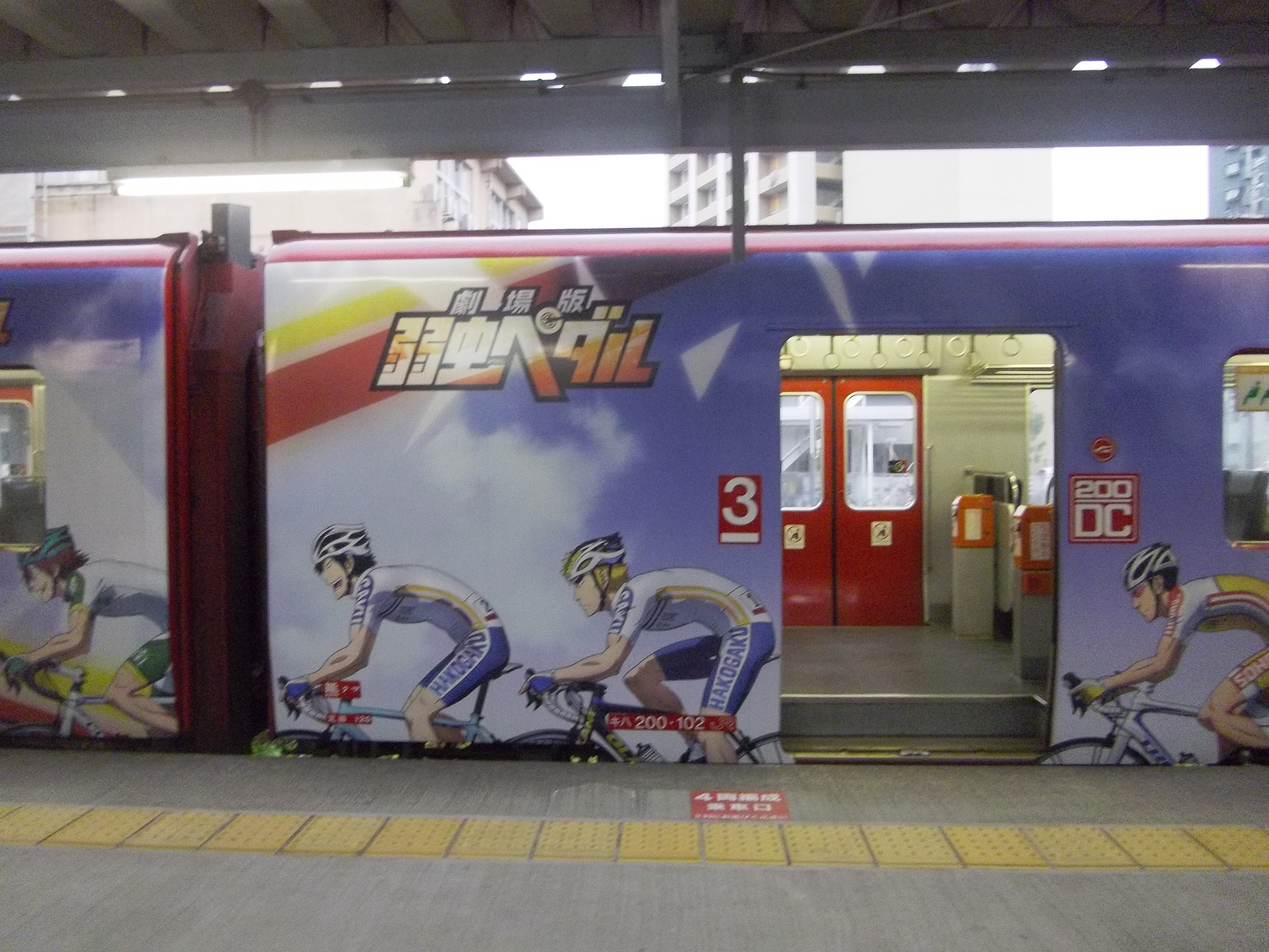 「弱虫ペダル」劇場版PR用ラッピング列車